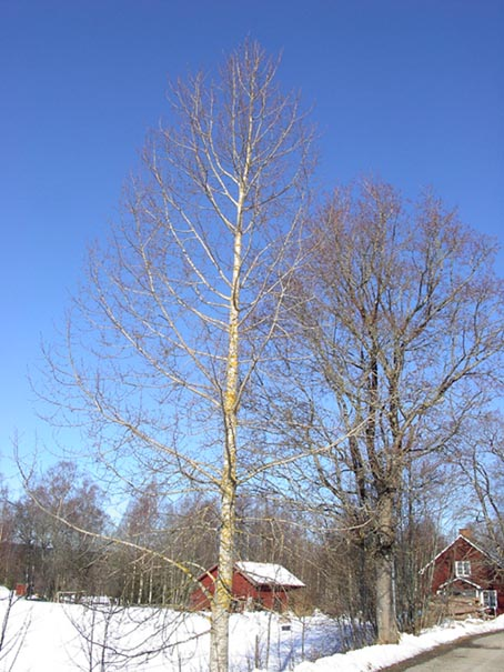 Populus tremula. Asp Vinter Photo: Damast